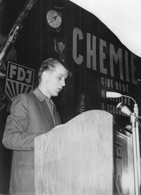 Zentralbild-Schmidt NI-Qu 1.2.1959 1. Konferenz junger Arbeiter und Aktivisten zur Verwirklichung des Chemieprogramms Am 31. Januar 1959 fand im Kulturpalast "Wilhelm Pieck" des Elektrochemischen Kombinats in Bitterfeld die 1. Konferenz junger Arbeiter, Aktivisten und der jungen Intelligenz zur Verwirklichung des Chemieprogramms statt. UBz. Der erste Sekretär der FDJ, Karl Namokel, bei seiner Ansprache.